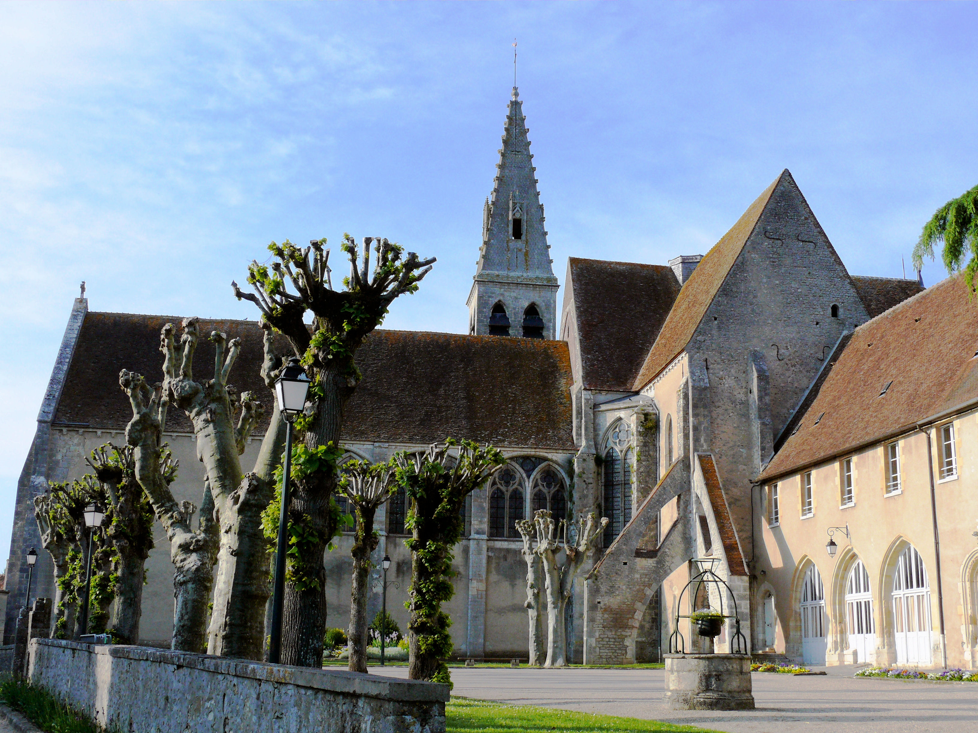 Ferrières - Abbaye - Eglise Saint-Pierre-et-Saint-Paul et bâtiments monastiques